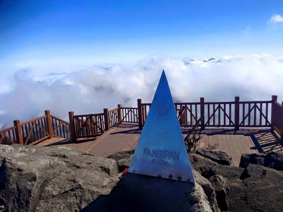 Chinh phục Nóc nhà Đông Dương – đỉnh Phan Si Păng